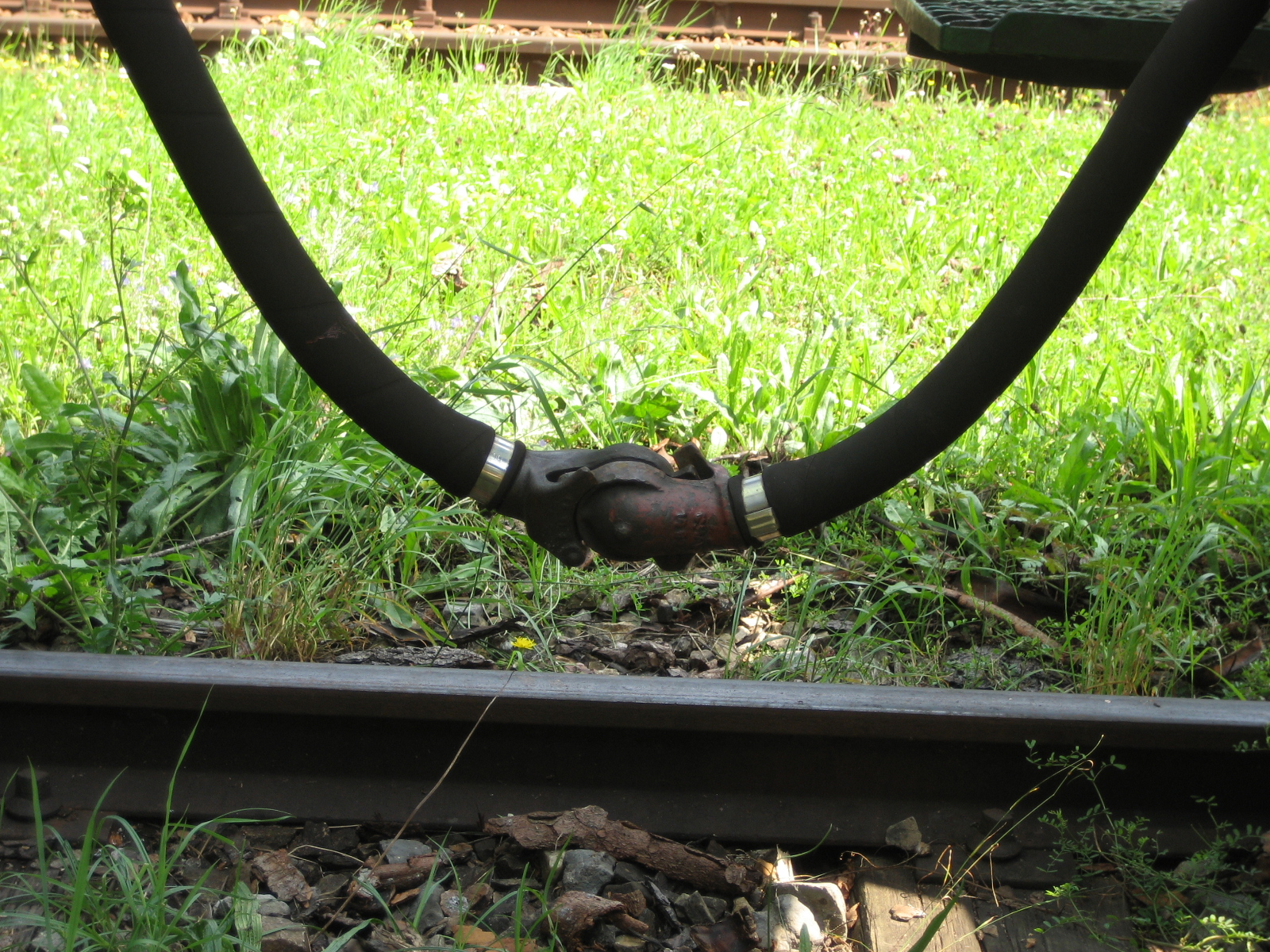 verbundene Druckluftleitung bei zwei Bahnwagons (Güterwagen)